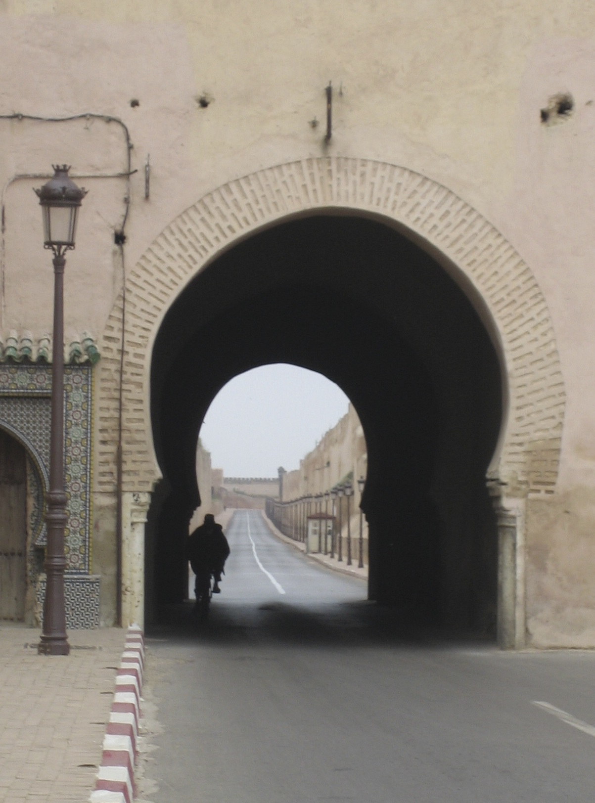 Bab Rih à Meknès (Maroc)